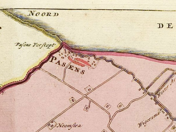 Detail van de kaart Oostdongeradeel in de Atlas Schotanus uit 1718